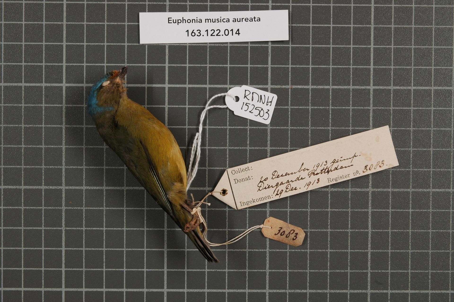 Euphonia musica aureata (Vieillot, 1822)